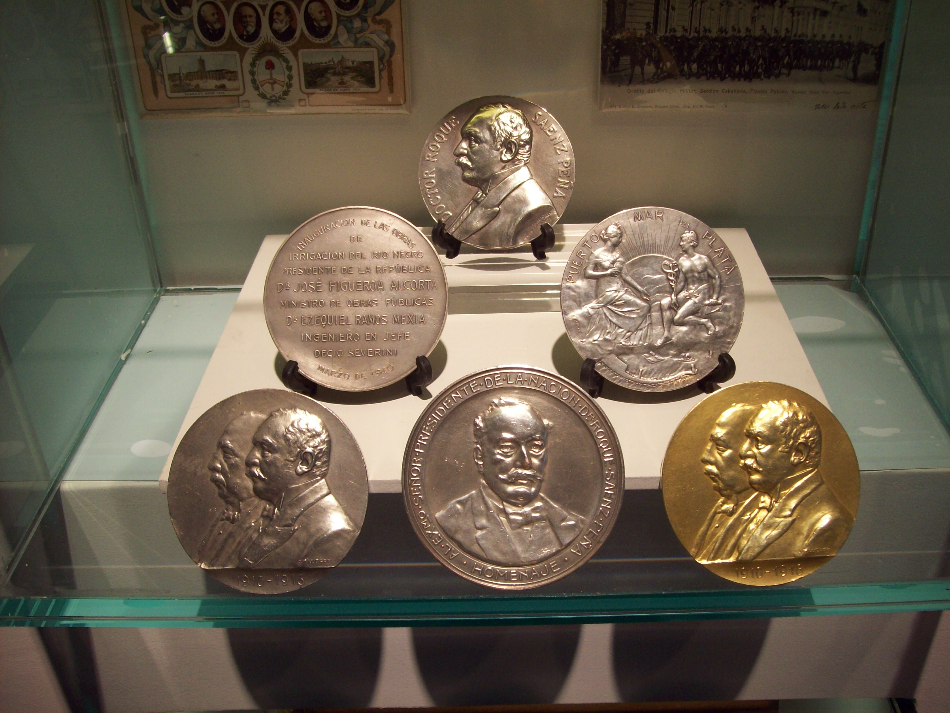 Medallas Roque Saenz Peña.